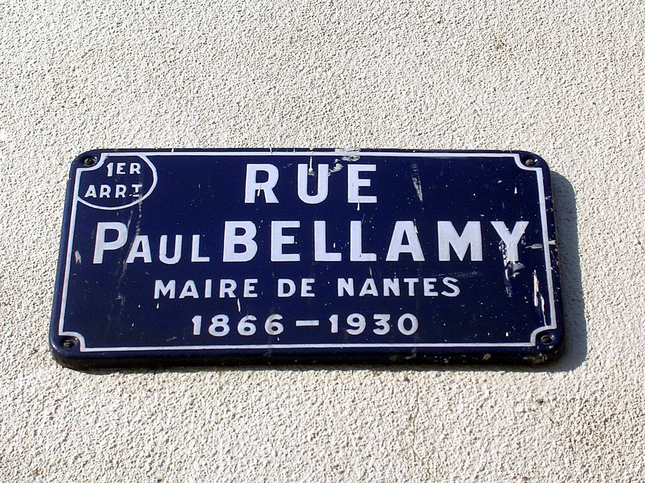 Rue Paul Bellamy, à Nantes